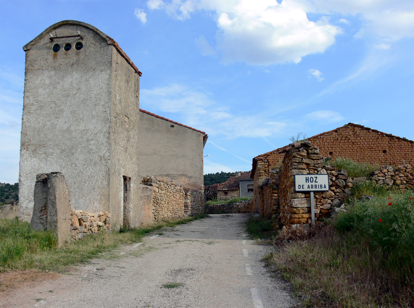 Hoz de Arriba, aldea de Montejo de Tiermes en la provincia de Soria (España).